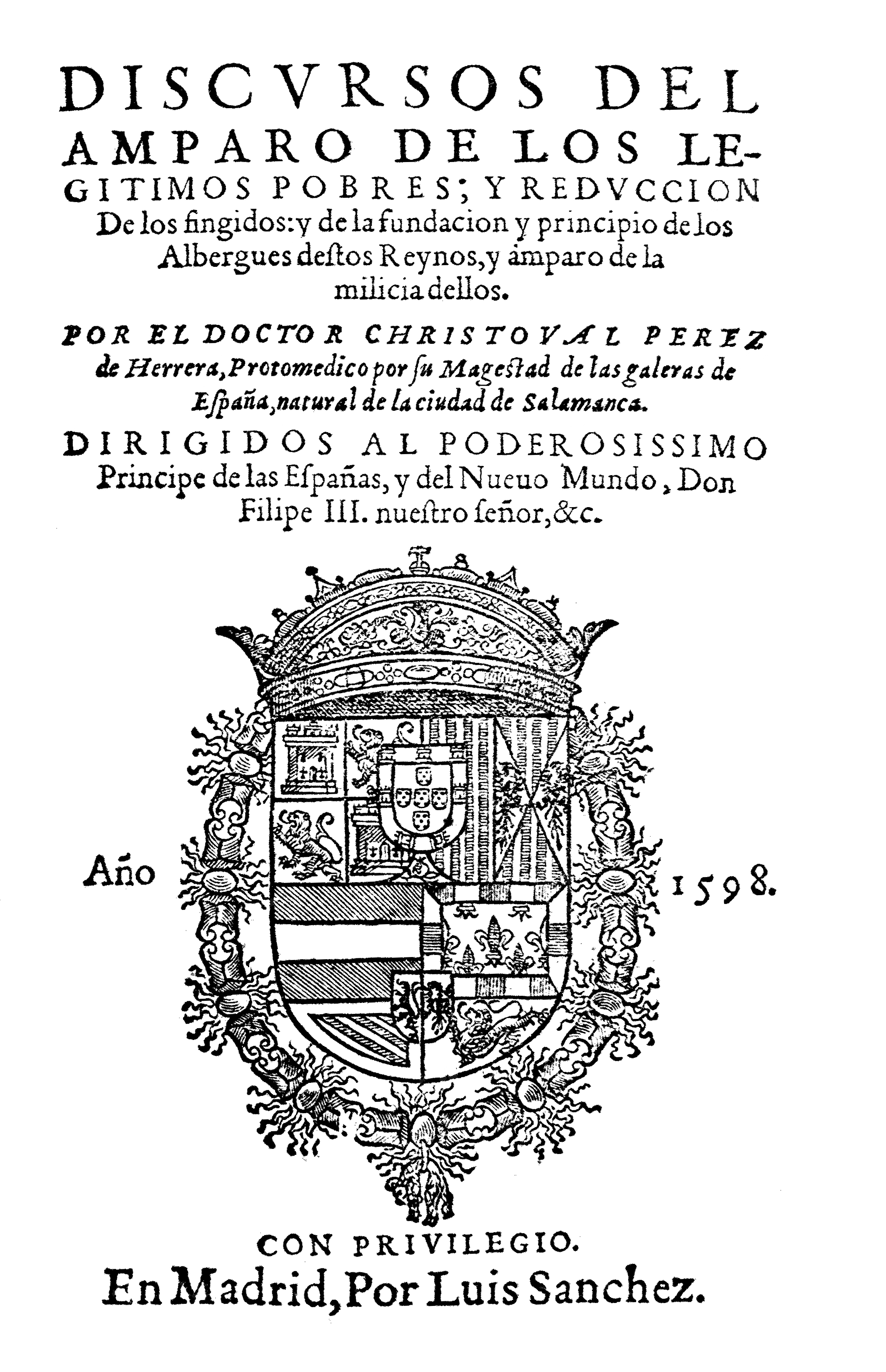 Portada del libro "Discursos del amparo de los legitimos pobres" de Cristóbal Pérez de Herrera, publicado en Madrid (España) en 1598.